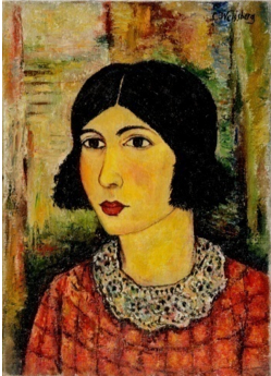 Tableau Portrait d’une jeune femme (Marie), de Léon Weissberg